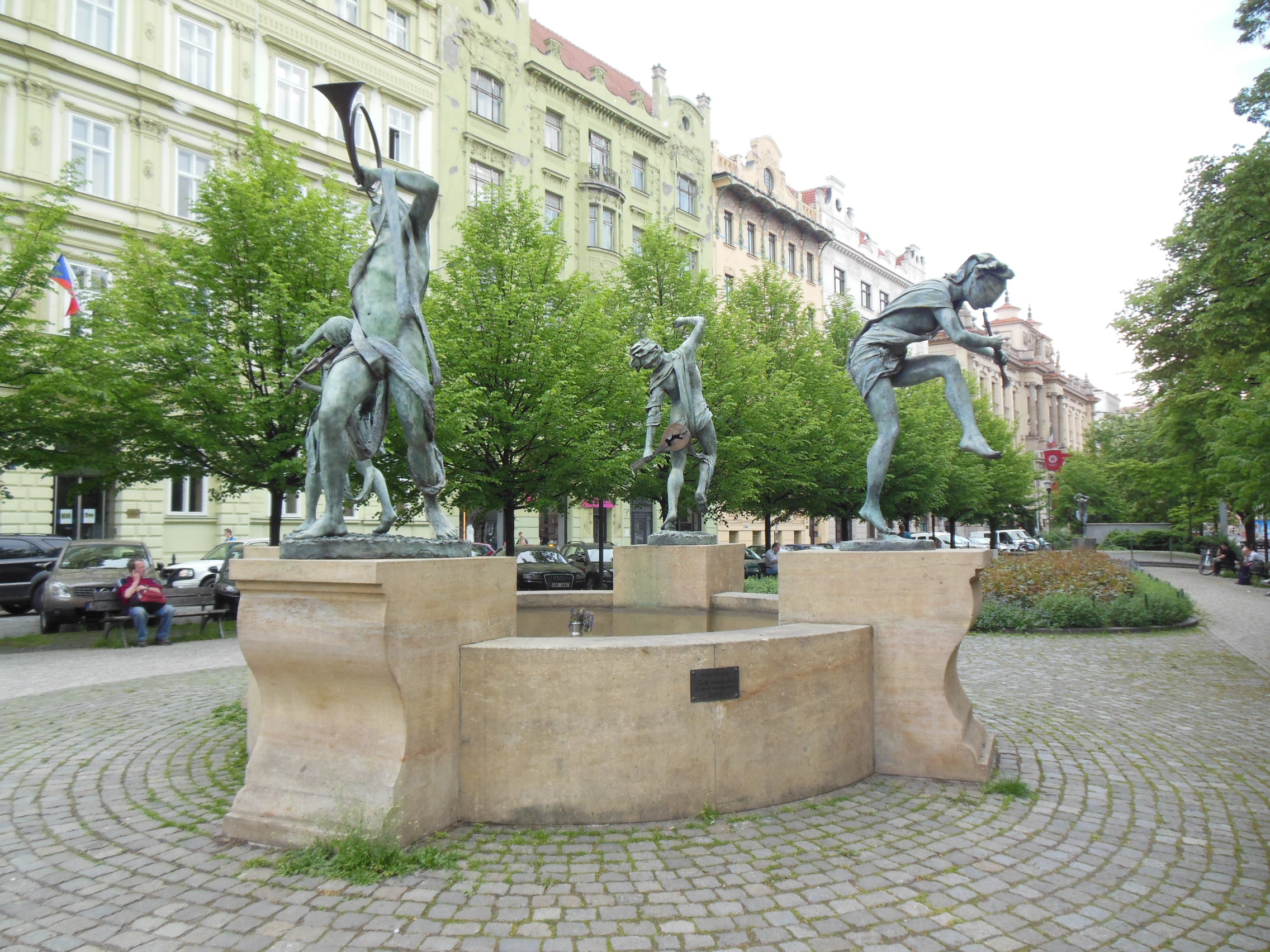 Kašna na Senovážném náměstí na Novém Městě v Praze.